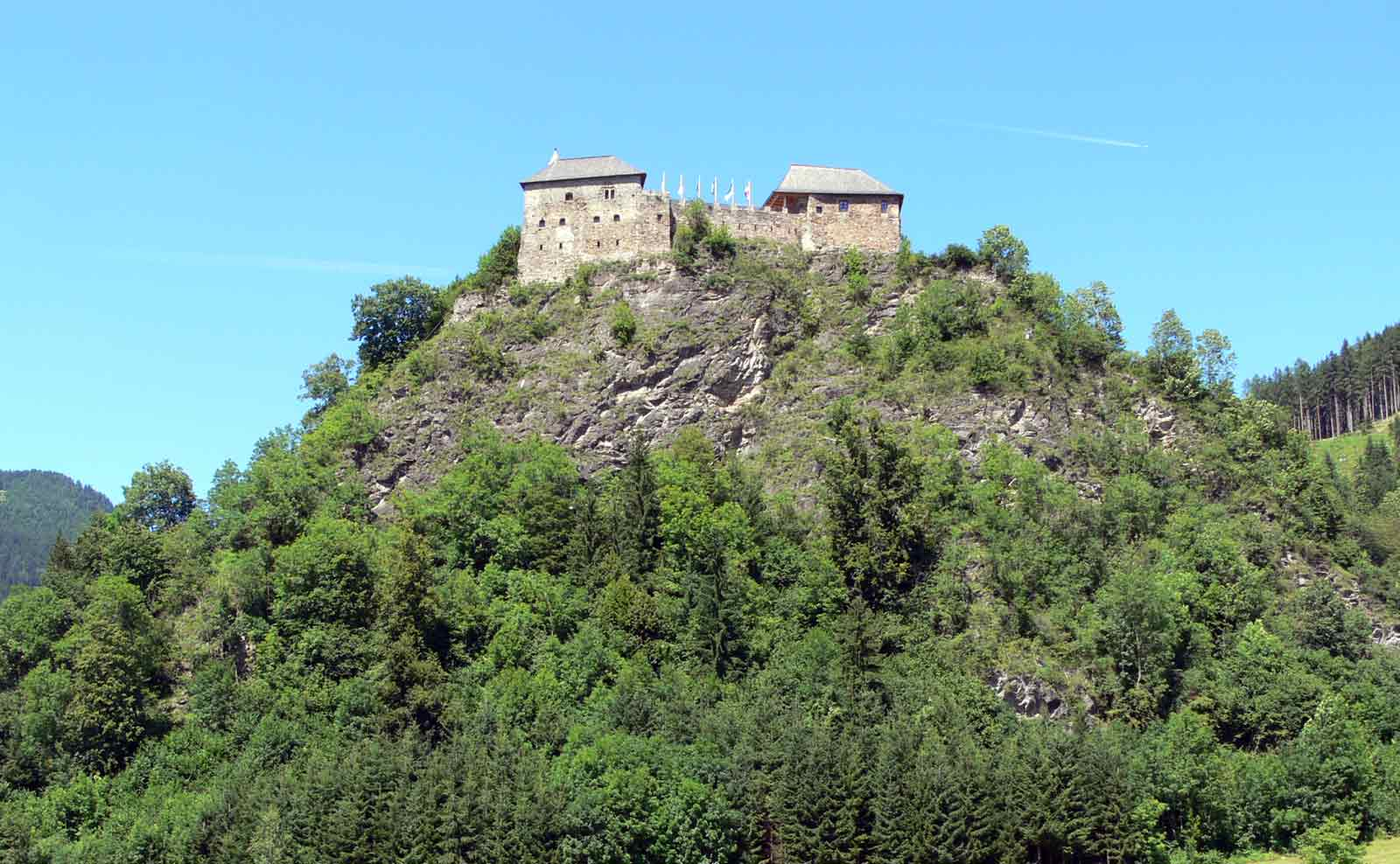 Burgruine Dürnstein